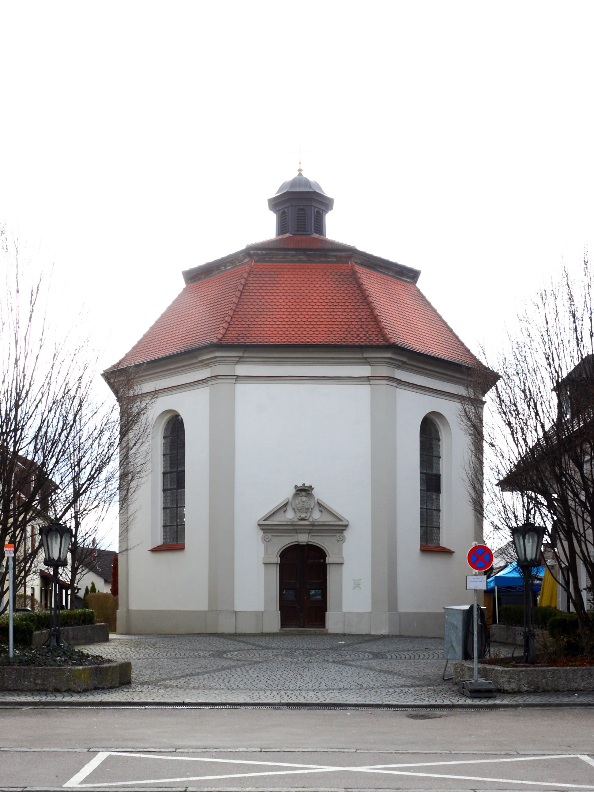 Kath. Stadionkapelle St. Simon und Judas in Thannhausen; Ostansicht